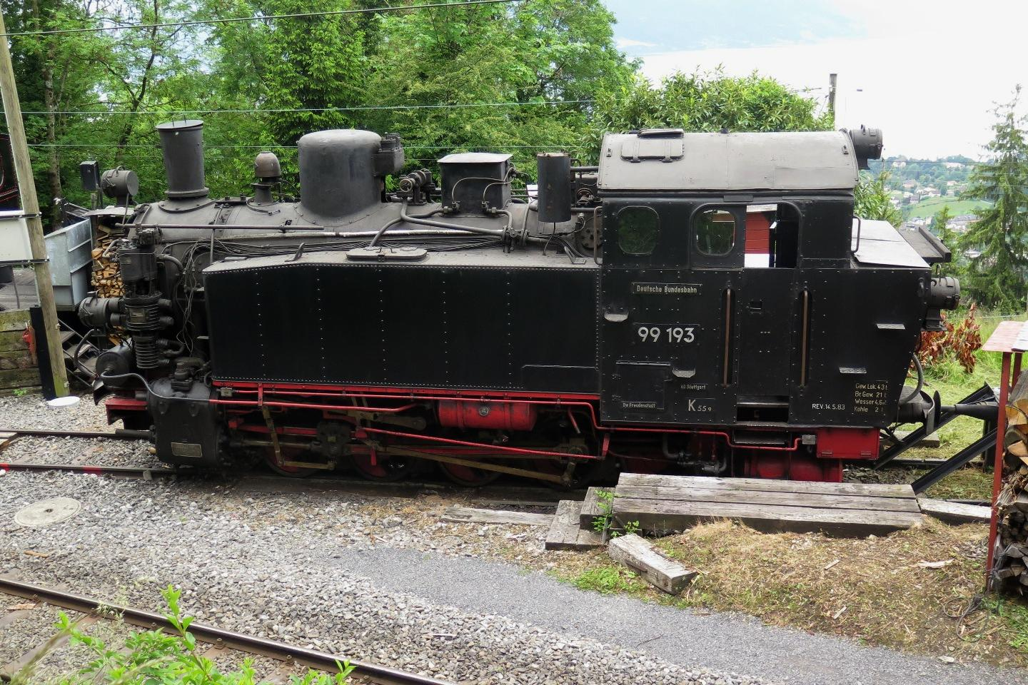 Dampflokomotive G 5/5 99 193 der Deutschen Bundesbahn von der meterspurigen Bahnstrecke Nagold–Altensteig bei der Museumsbahn Blonay–Chamby in Chamby-Musée (Chaulin).